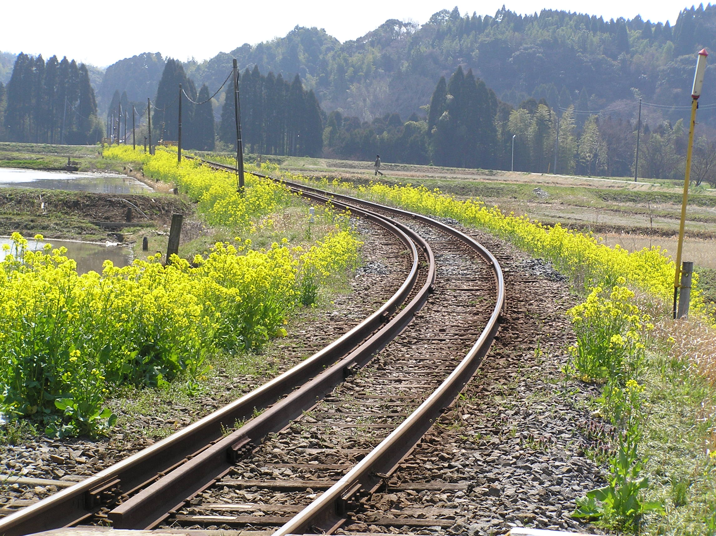 いすみ鉄道 西部田村 ～photo by Autumn Snake【おぉたむすねィく探検隊】